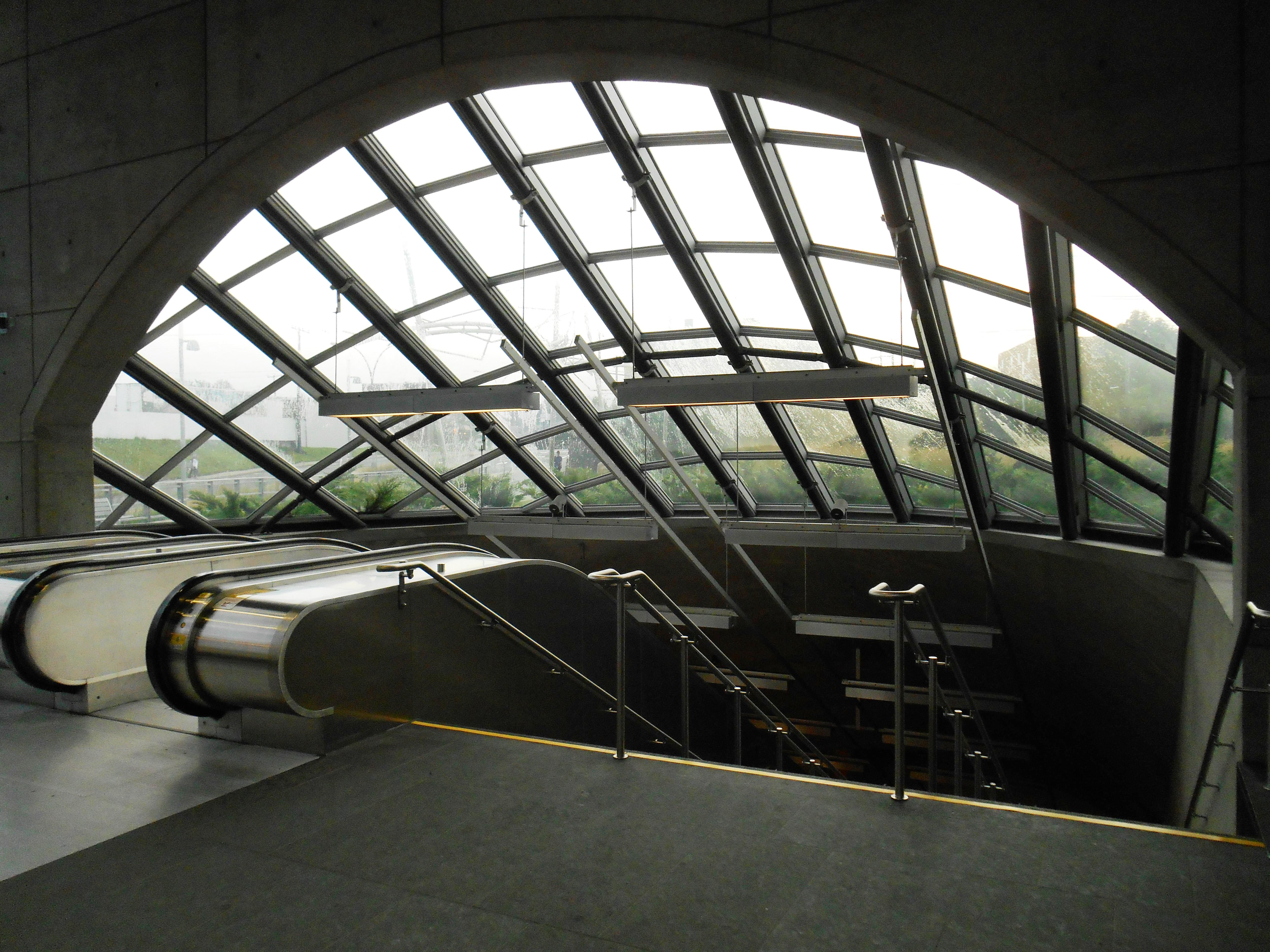 Station de métro de la Concorde à Laval